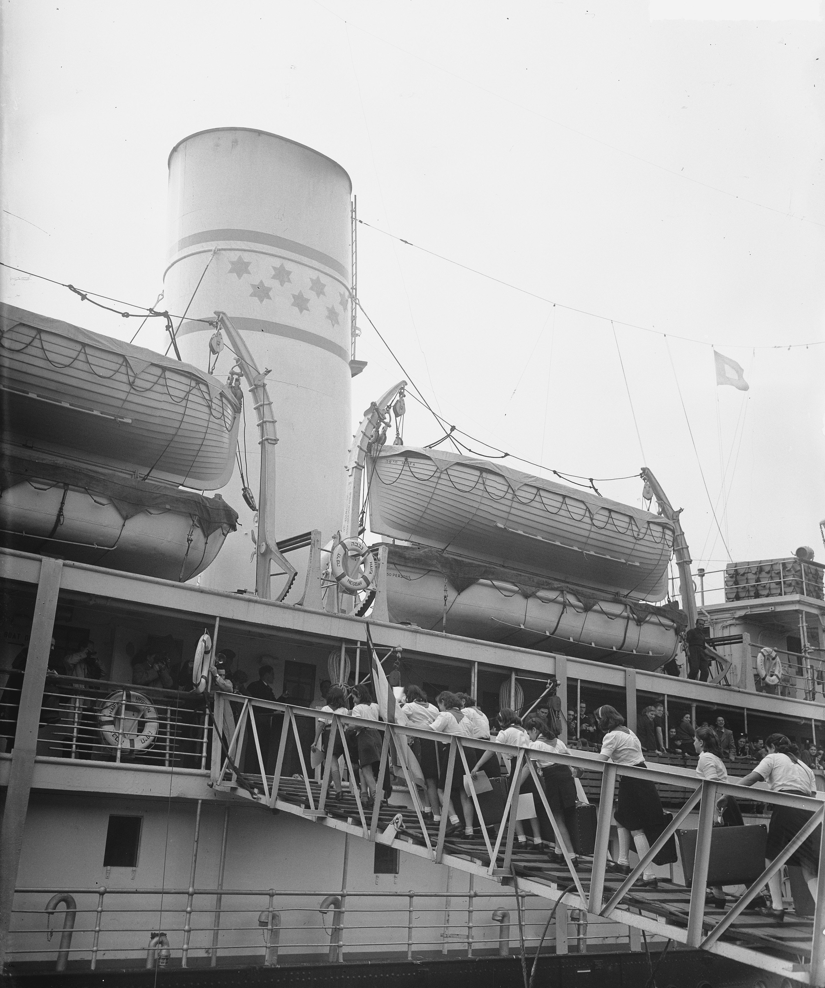 Collectie / Archief : Fotocollectie Anefo Reportage / Serie : [ onbekend ] Beschrijving : Vertrek "Negba" naar Tel Aviv Datum : 6 oktober 1948 Locatie : Israël, Tel Aviv Trefwoorden : VERTREK Fotograaf : Merk, Ben / Anefo Auteursrechthebbende : Nationaal Archief Materiaalsoort : Glasnegatief Nummer archiefinventaris : bekijk toegang 2.24.01.09 Bestanddeelnummer : 903-0409 Reacties Geplaatst door Geertje op 07 augustus 2014 - 13:28. Locatie: Javakade Plaats: Amsterdam, Noord-Holland Bestemming: Israël NB. Dit was het voormalige Panamese schip 'Luxor' die werd omgedoopt tot Israëlisch schip ss.'Negbah' en mensen naar het beloofde land bracht. Hieronder bevond zich een groep Roemeens Joodse kinderen die de concentratiekampen heeft overleefd en na de oorlog in het Apeldoornse bos waren ondergebracht tot de dag van vertrek. Dit vaartuig was van de Israëlische Scheepvaart Mij. 'Zim' Navigation Company Ltd. Het zogenoemde emigrantenschip.